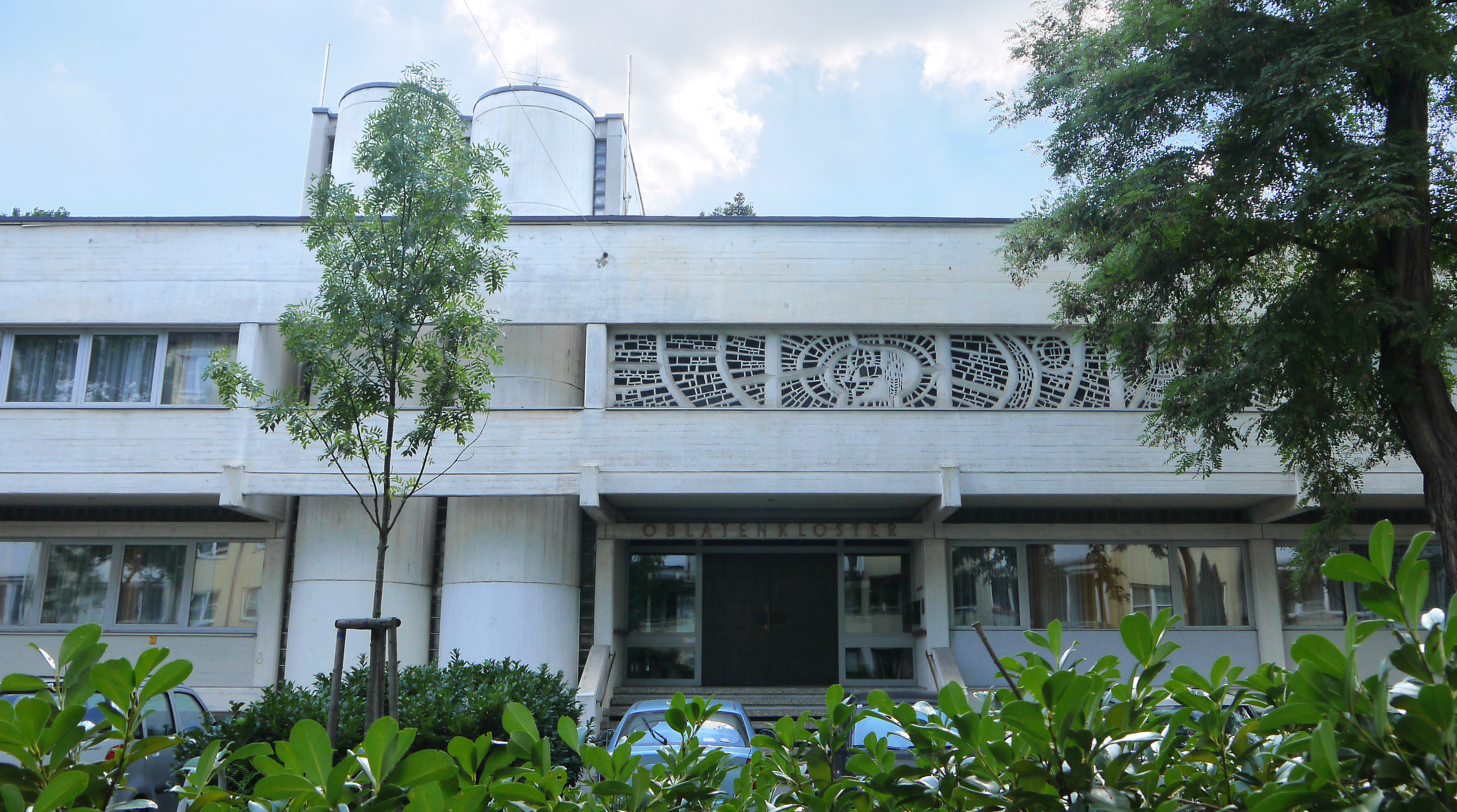 Oblatenkloster St. Paul